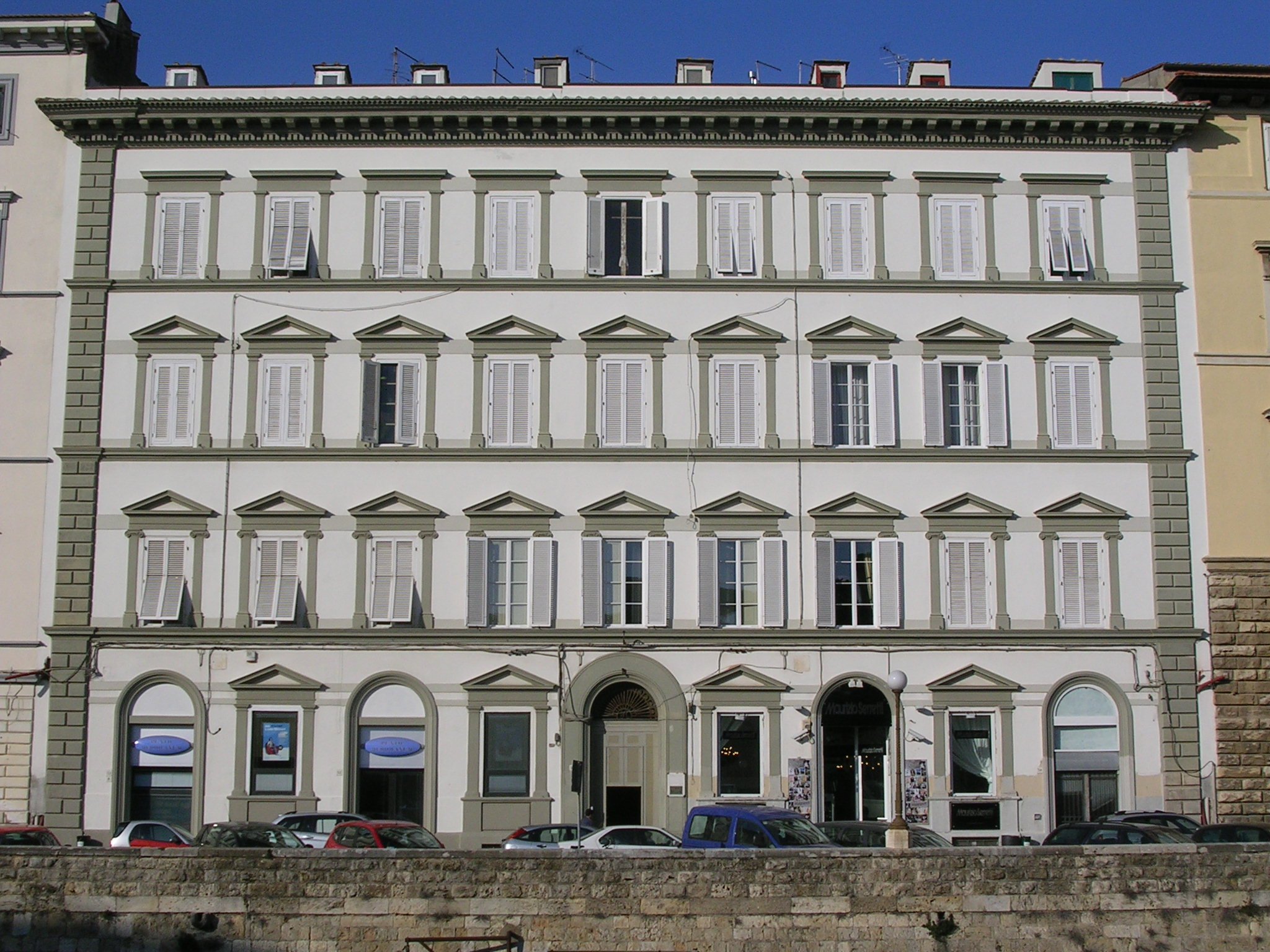 Livorno: il Palazzo Reggio sul Fosso Reale.